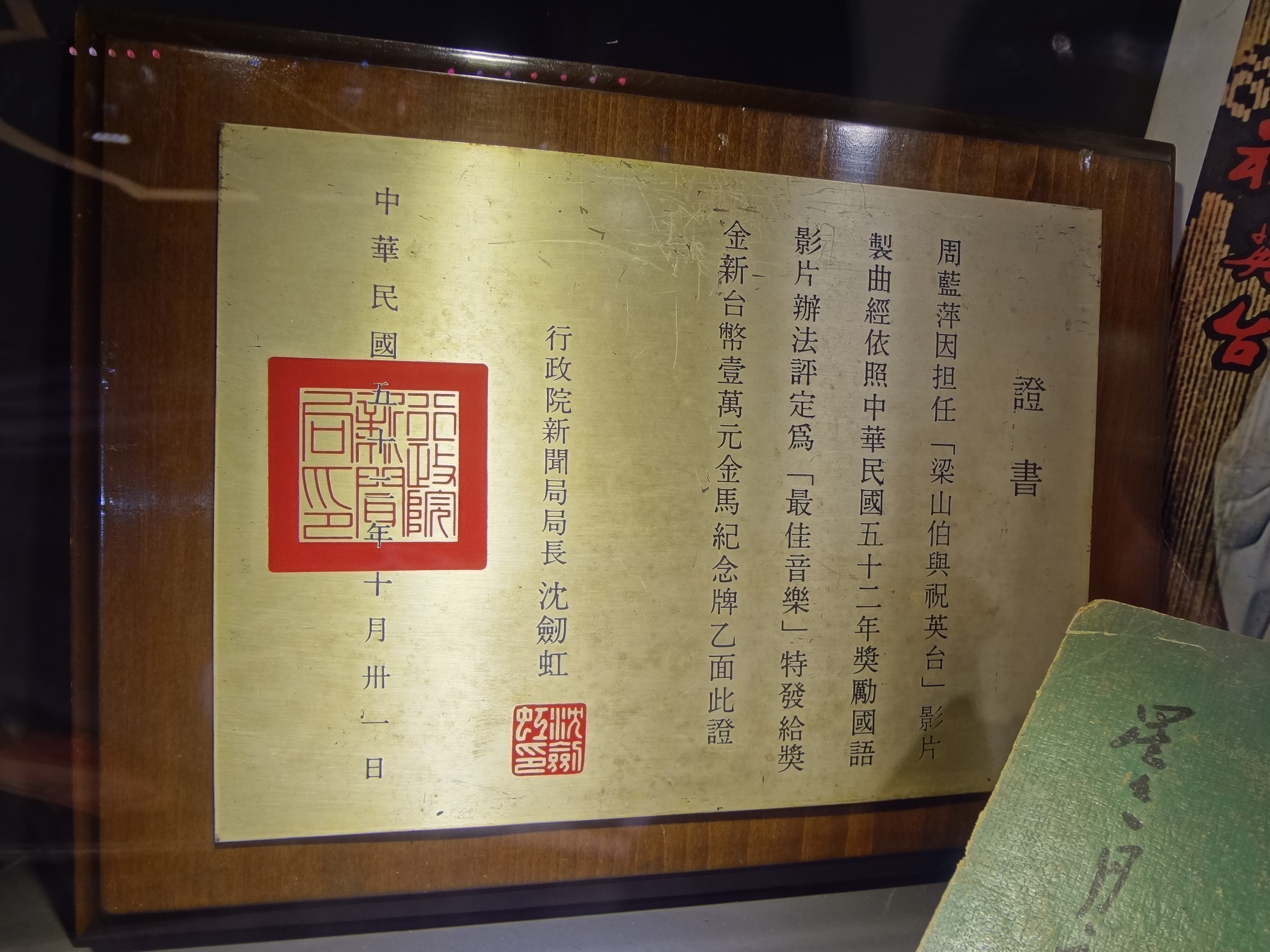 行政院新聞局發給周藍萍的金馬獎最佳音樂獎證書。